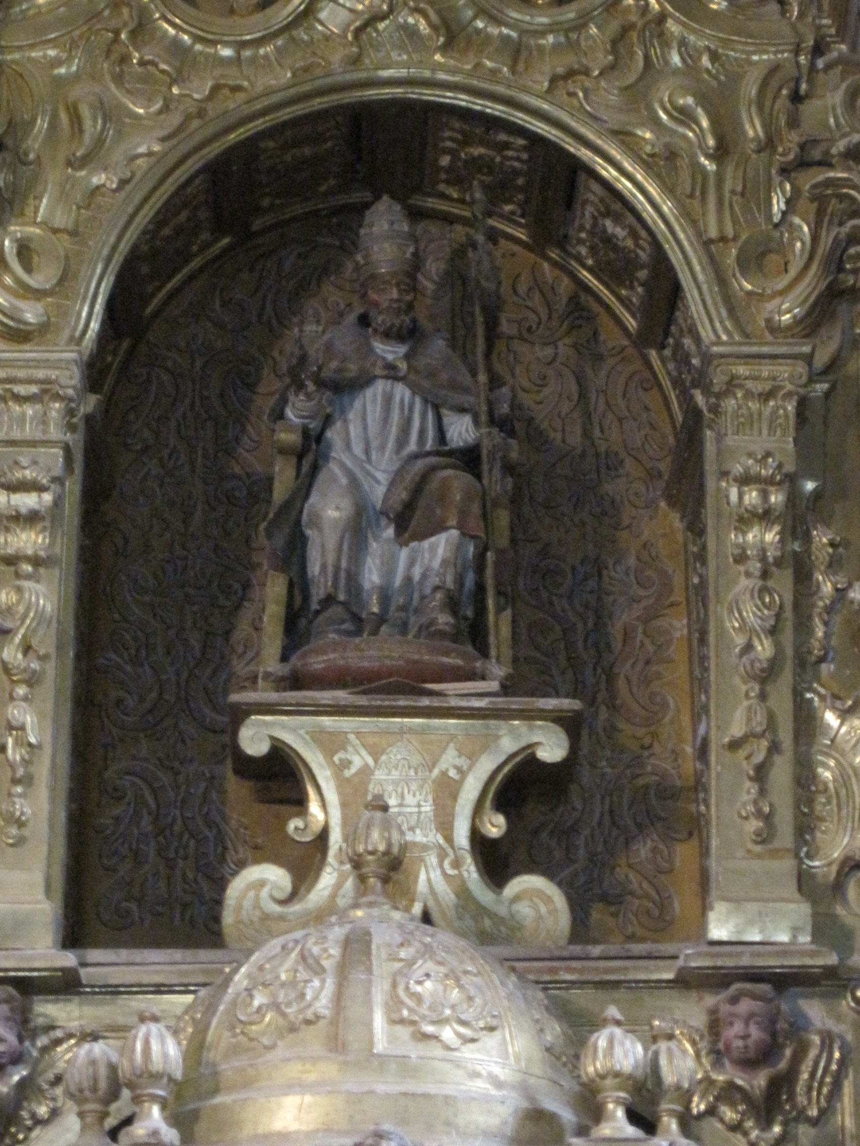 Imagen de San Pedro en el retablo del altar de la iglesia de Quintanarraya (Burgos, España).